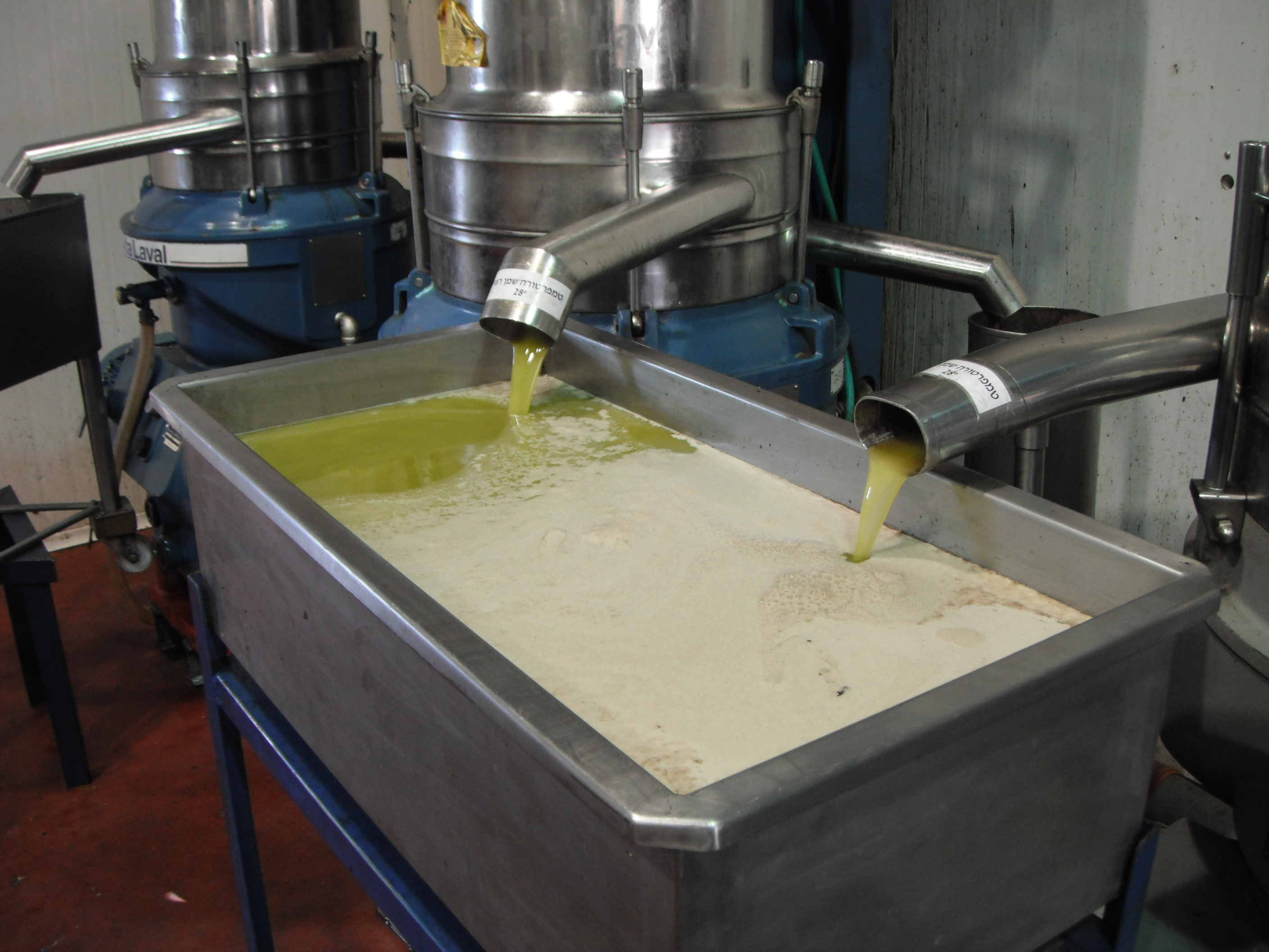 שמן לאחר כבישה